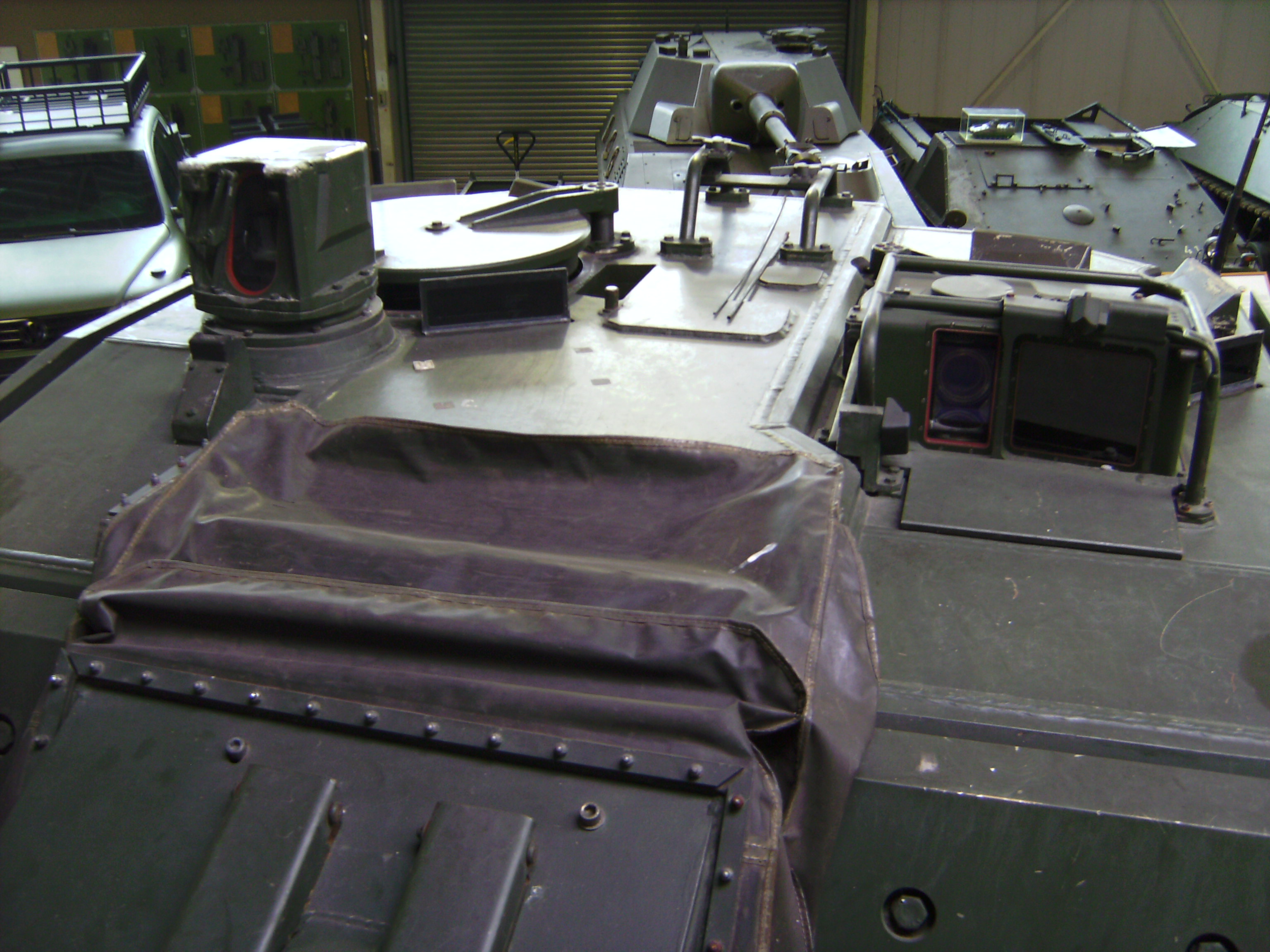 Marder 2 in der Wehrtechnischen Studiensammlung in Koblenz